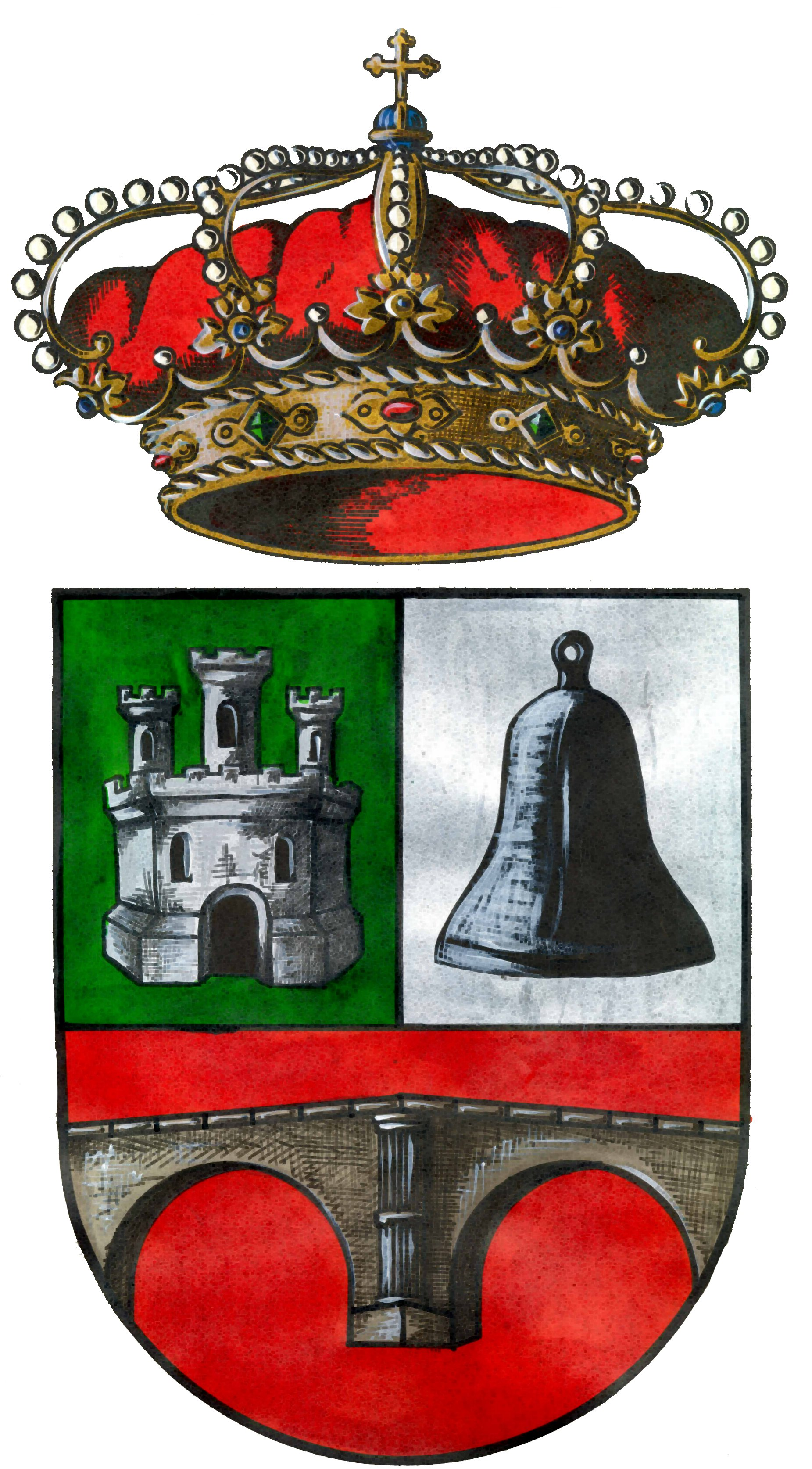 Heráldica de Romangordo.Cáceres